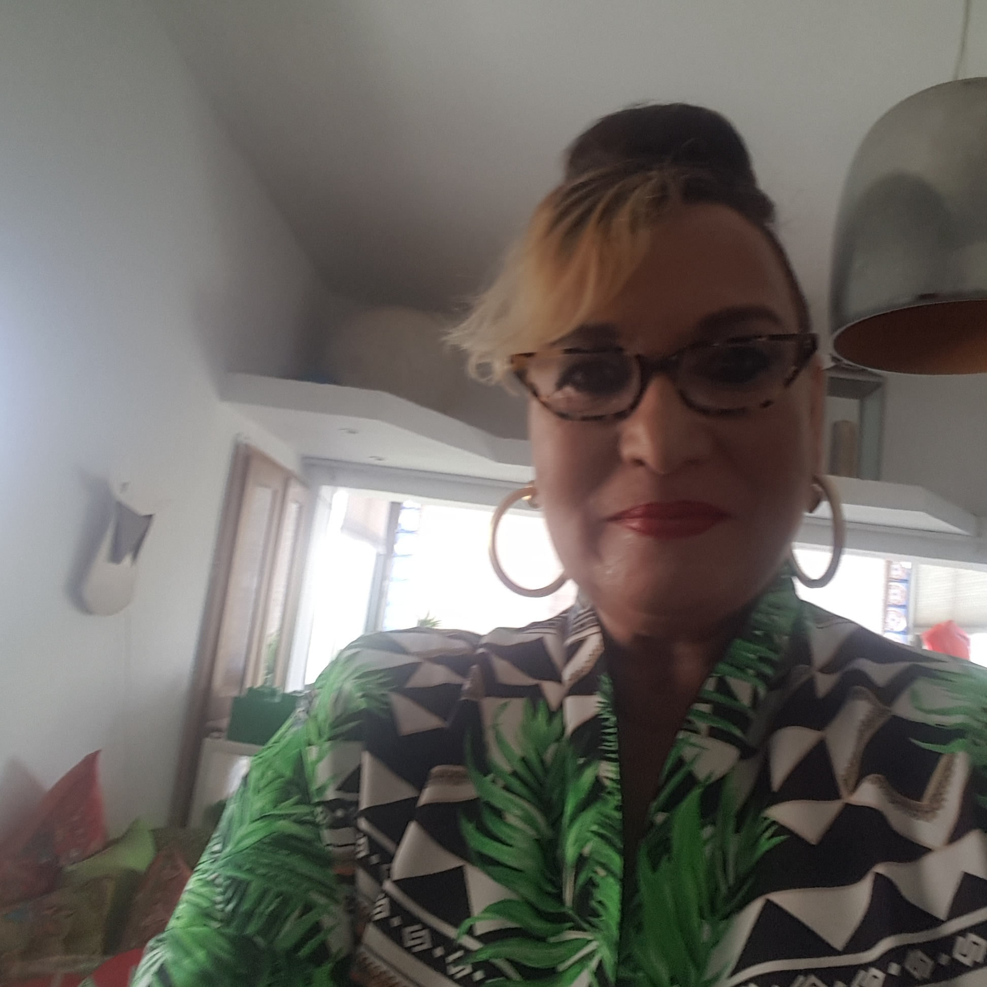 שרי צוריאל 2018 בבית בתל אביב